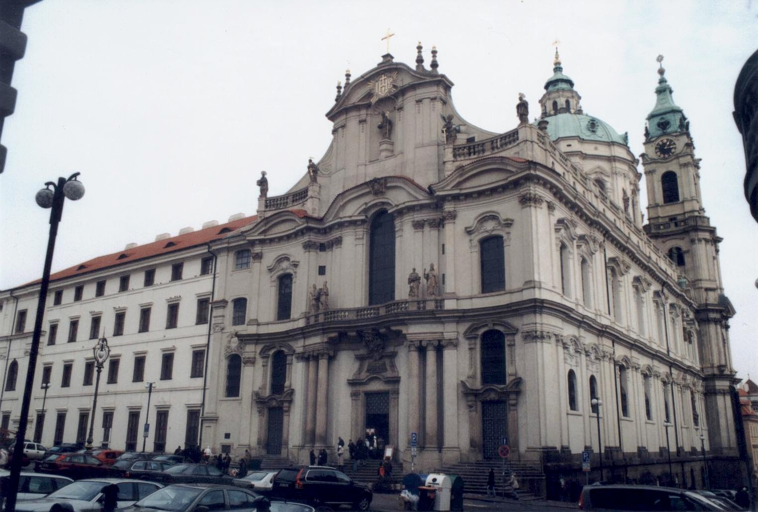 Kryštof Dientzehofer, průčelí kostela sv. Mikuláše v Praze na Malé Straně